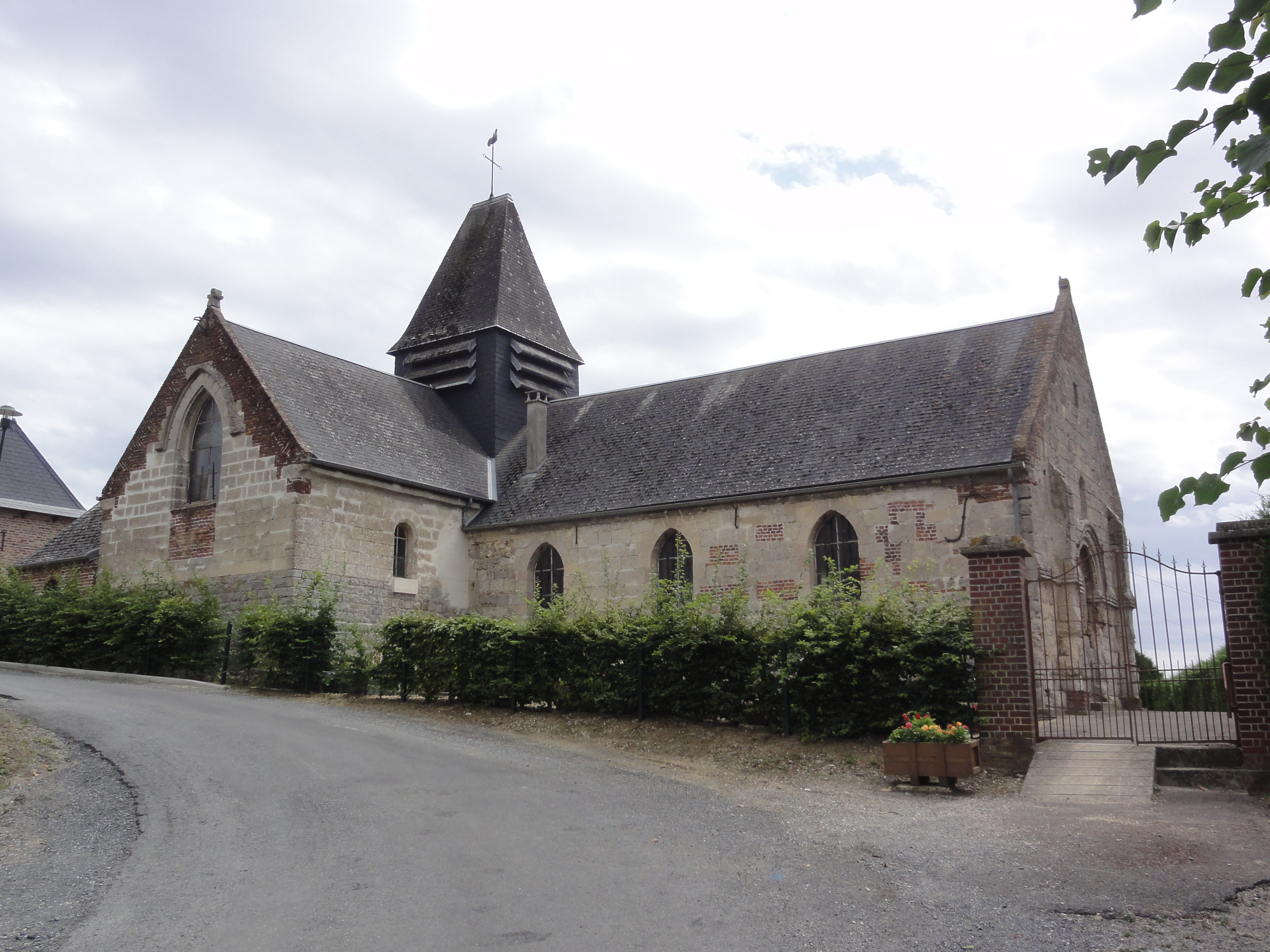 La Neuville-en-Beine (Aisne) église Notre-Dame